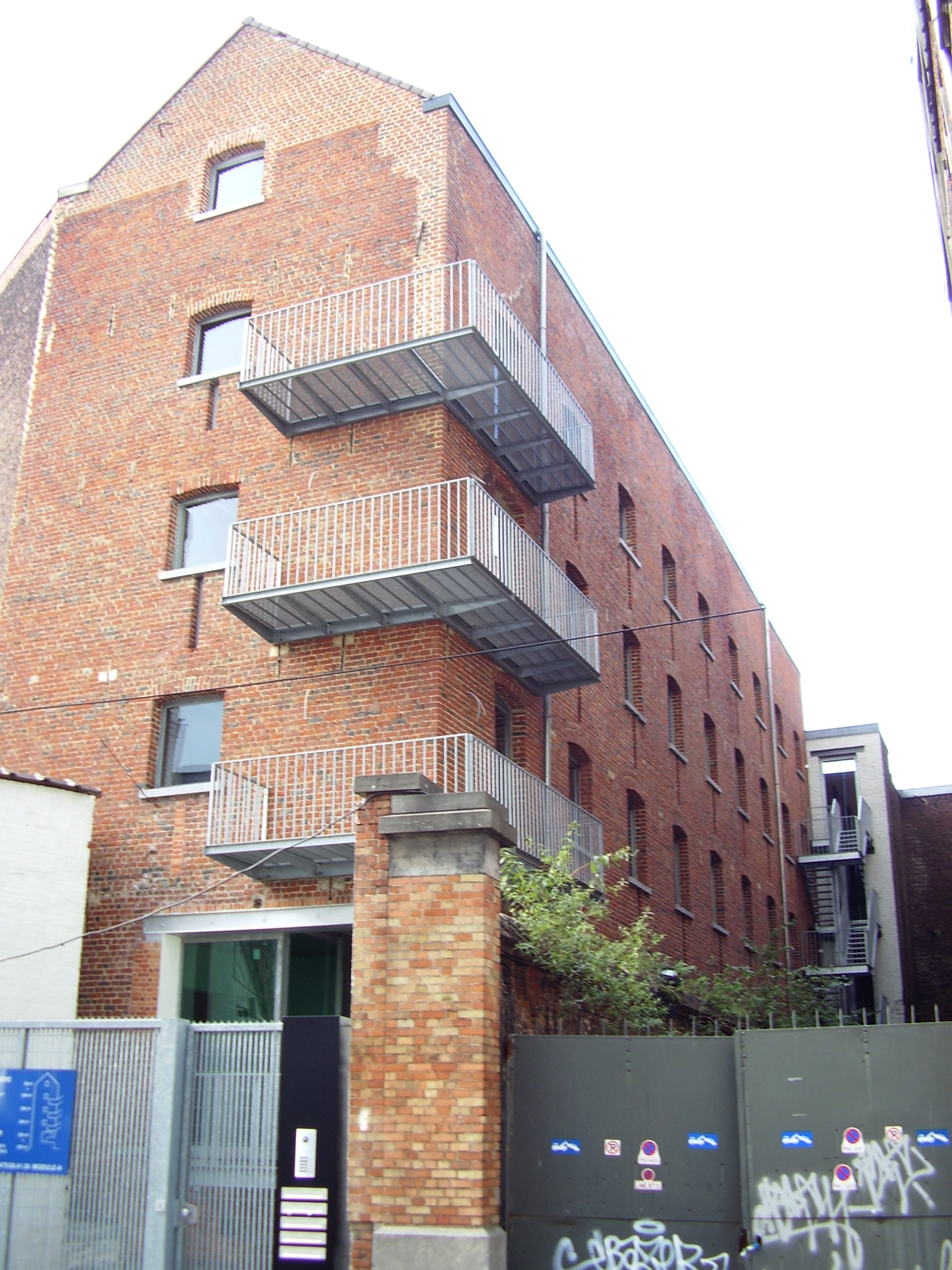 Loft, bâtiment industriel transformé en appartements résidentiels, Bruxelles